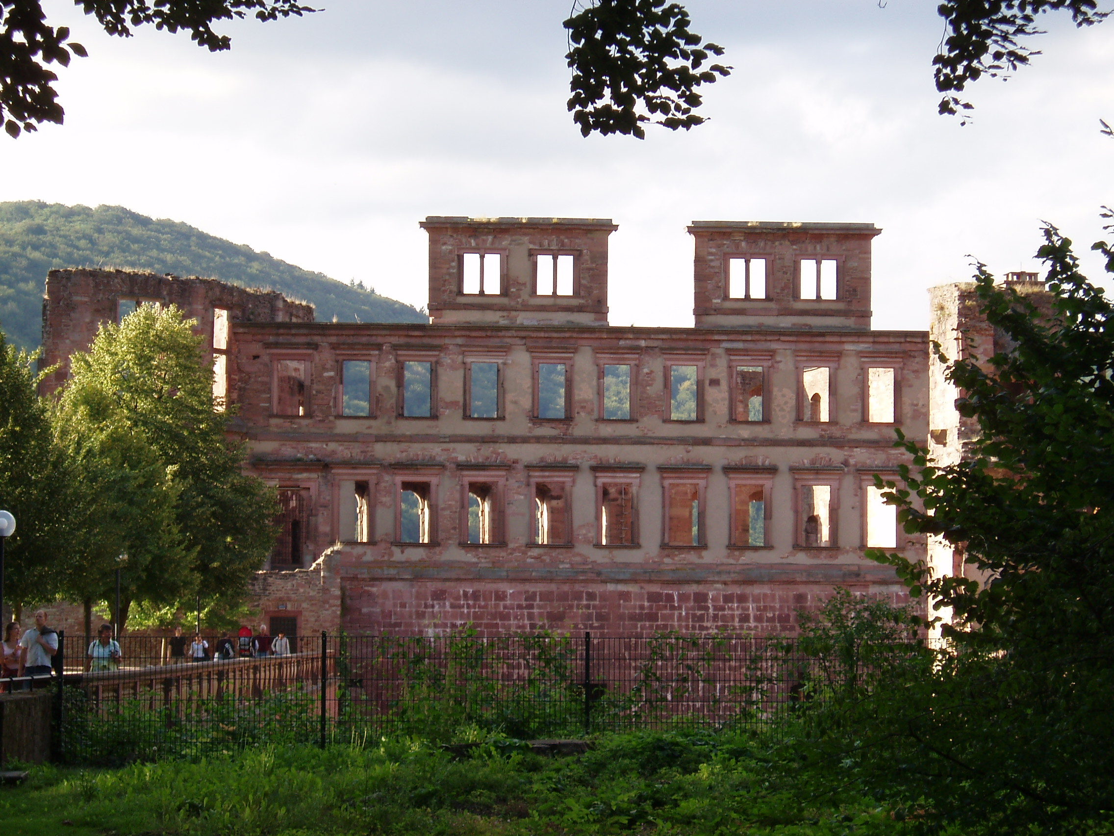 Heidelberg - castle